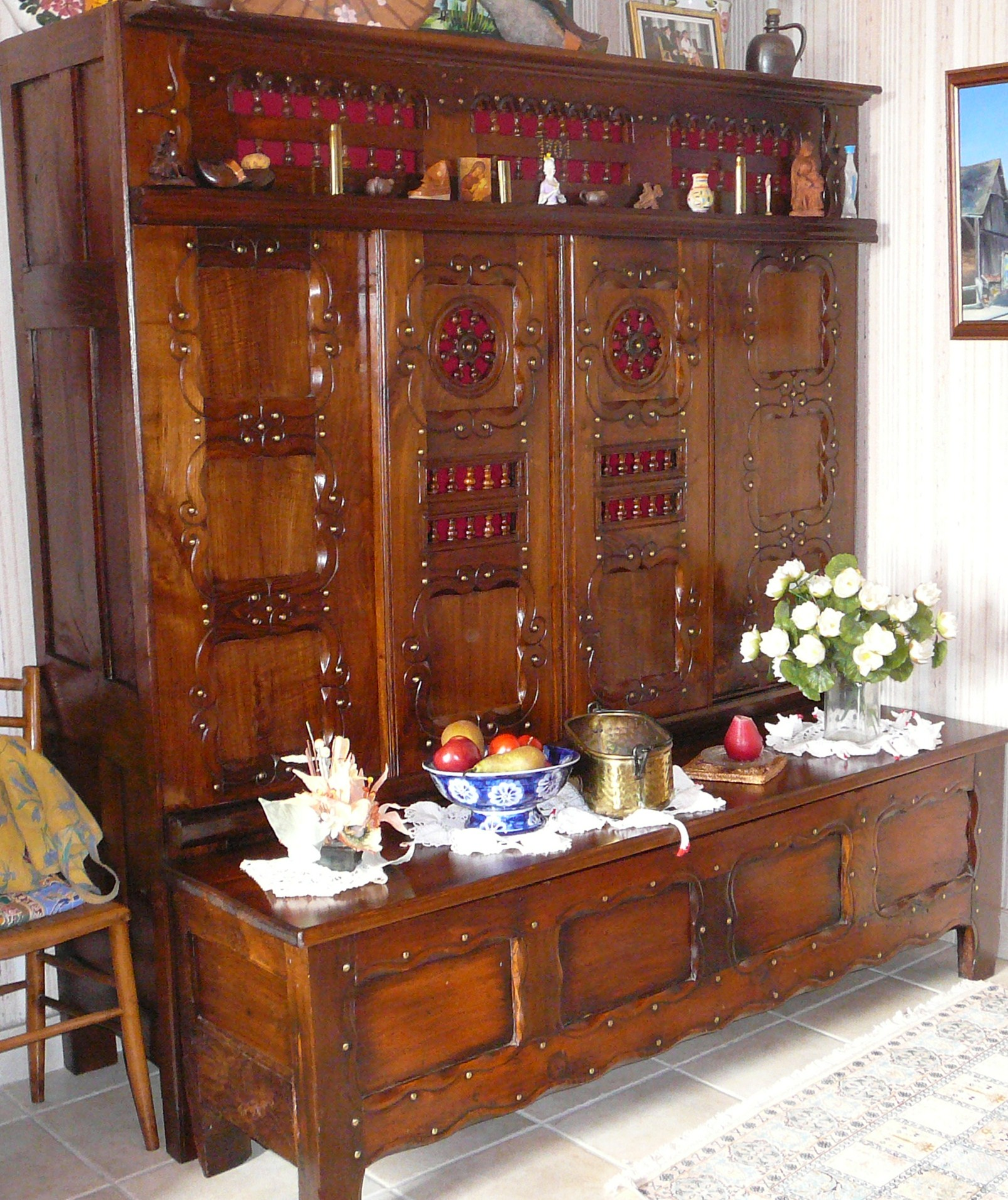 Lit clos aménagé en buffet et son banc